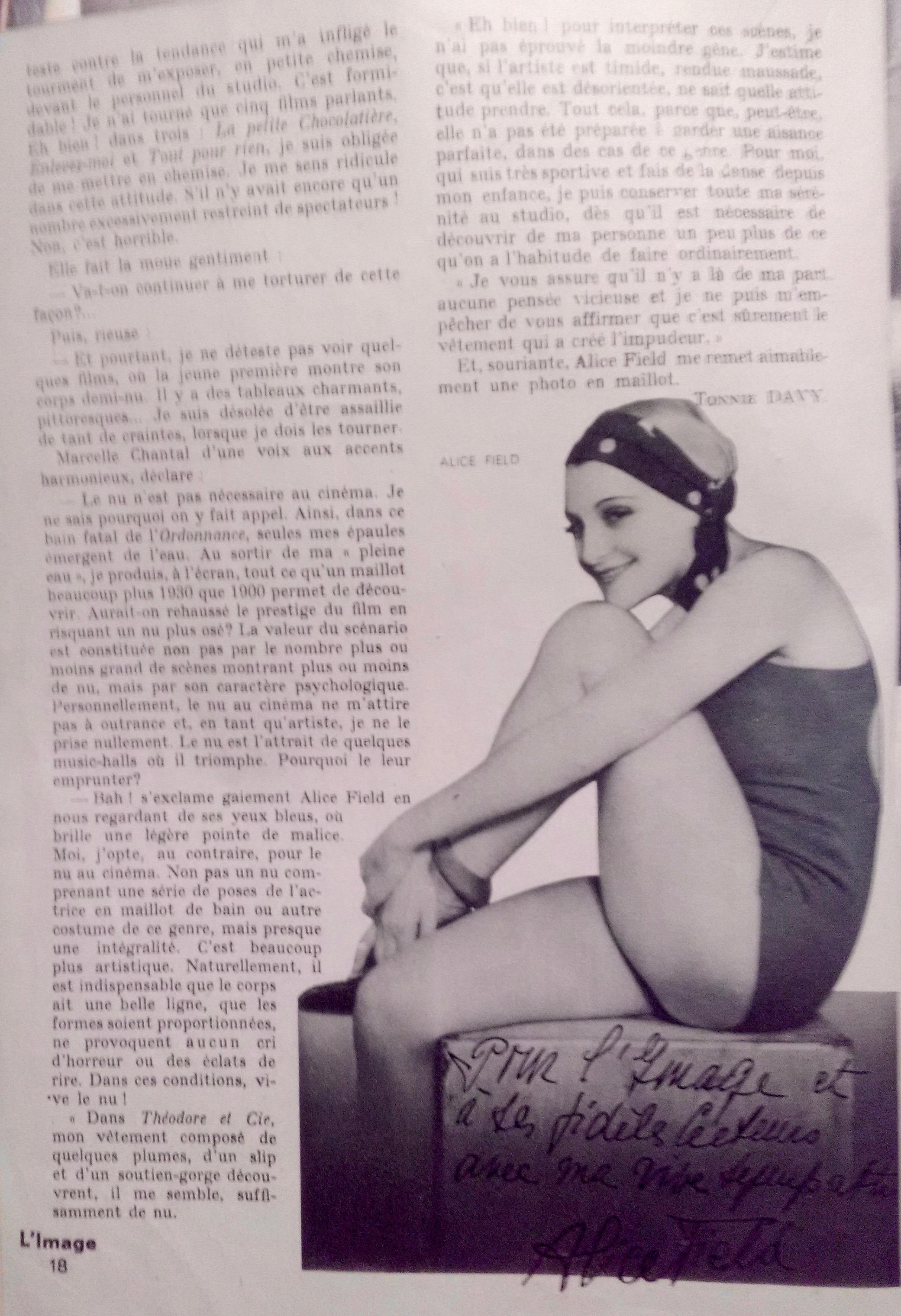 Article sr Alice Field dans "L'Image".